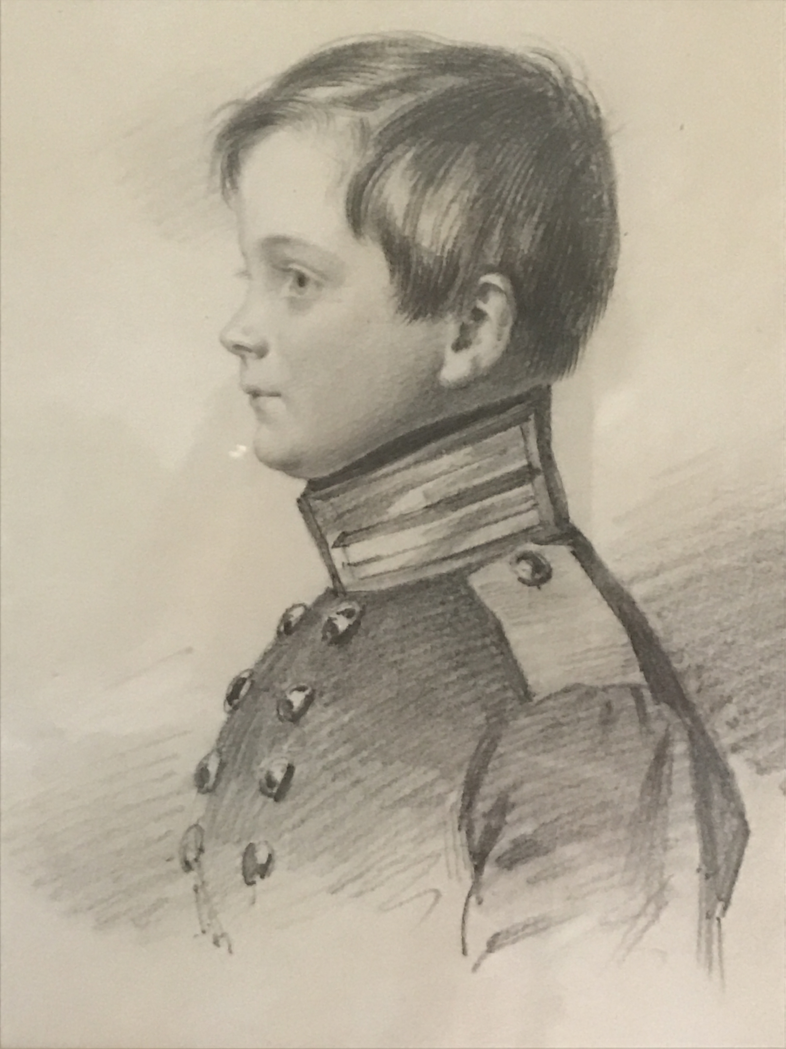 Alfred von Rauch im Alter von 11 Jahren als preußischer Kadett in Potsdam; Zeichnung von Franz Krüger, 1835